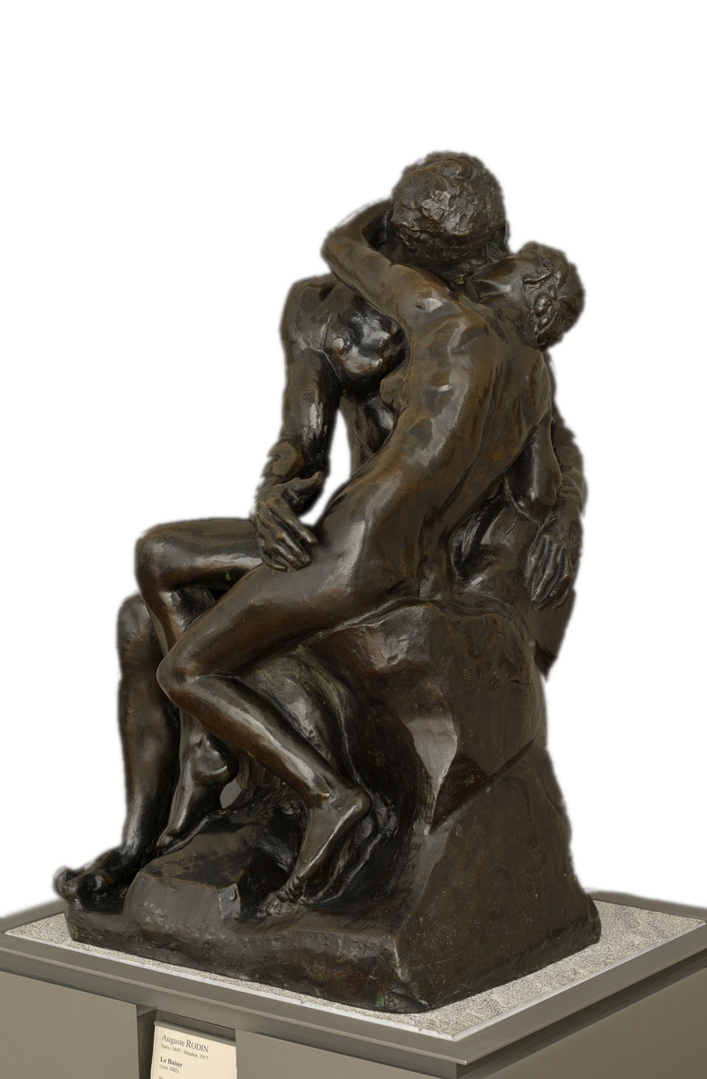 Le Baiser